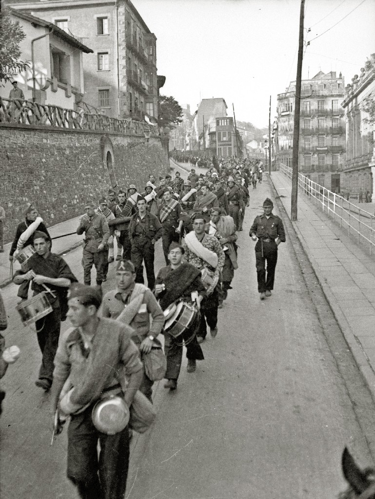 Título original: Recibimiento a las tropas del bando nacional (20/34) Localización: San Sebastián (Guipúzcoa)